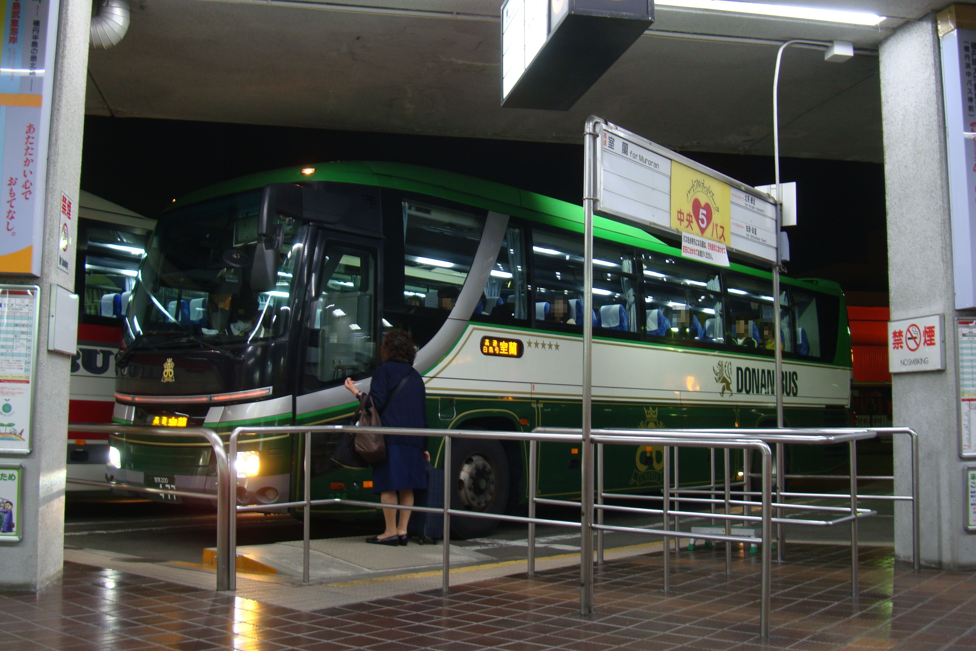 "Kōsoku Hakuchō gō" Sapporo to Muroran